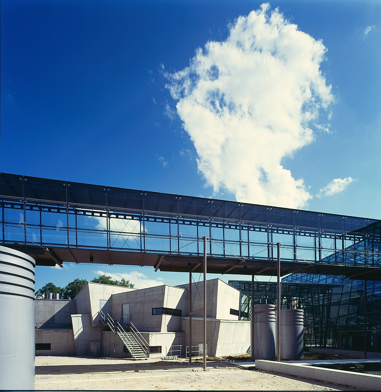 Das Hörsaal-Gebäude der THI (Gebäudeteil E). Errichtet 1998.